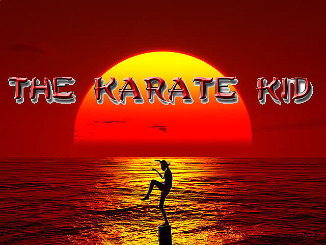 Karate Kid